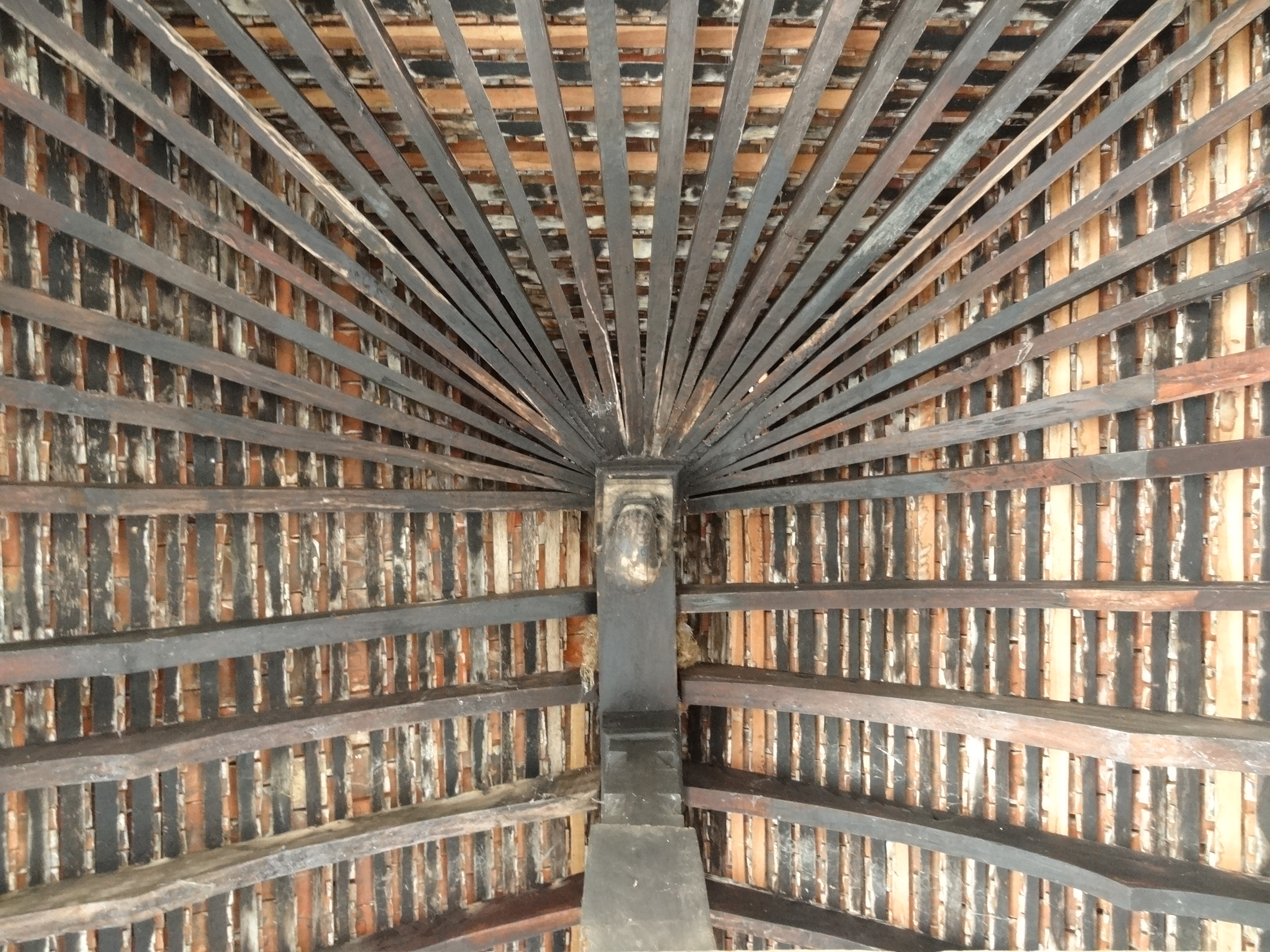 Embekka Devalaya